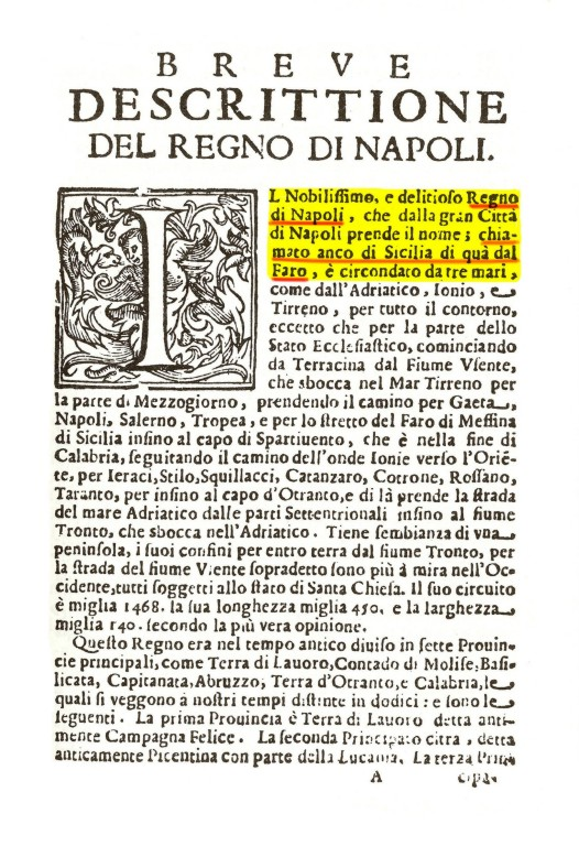 Bacco-Prima pagina Riproduzione da una ristampa anastatica Autorizzato alla pubblicazione dal detentore del copyright, via e-mail in data 09/01/2008. Oggetto: Informazioni richieste Egregio Ing. Del Monaco, Concediamo senz'altro l'autorizzazione alla pubblicazione del frontespizio e della prima pagina dell'opera del Bacco, "Nuova descrizione del Regno di Napoli", con la clausola che venga citata anche la Casa Editrice Arnaldo Forni. Cordiali saluti. ARNALDO FORNI EDITORE Dott.ssa Aurelia Forni